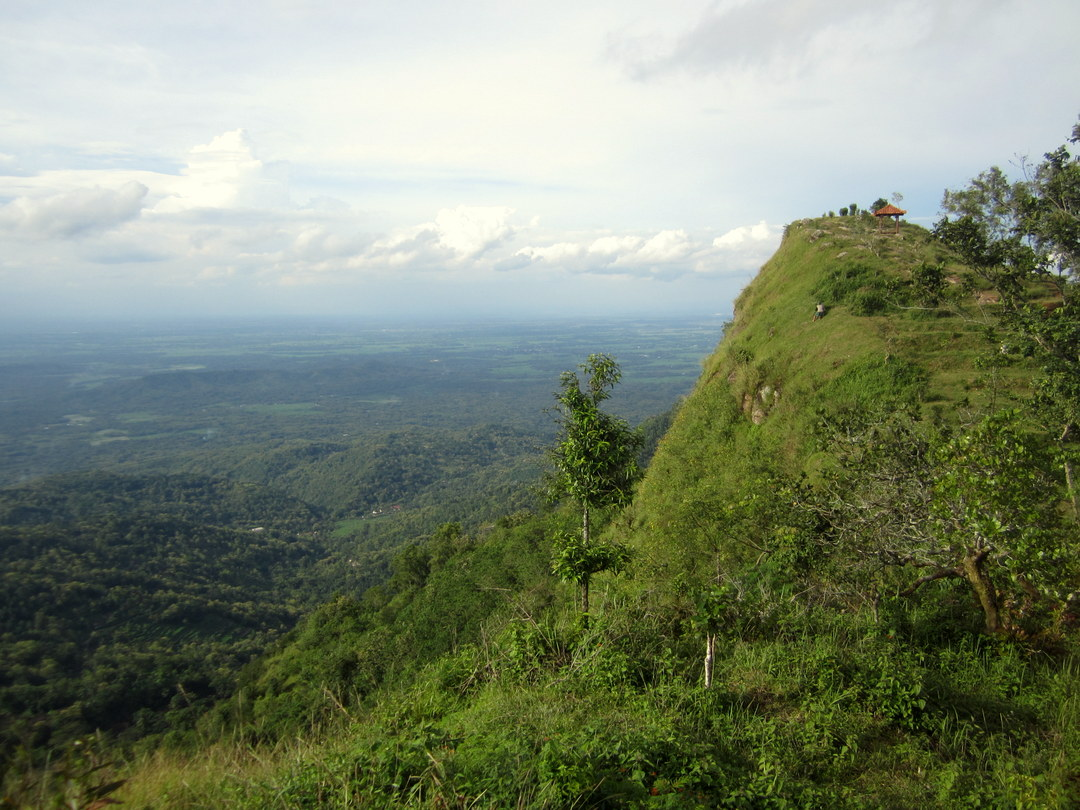 Puncak Gunung Baturagung atau yang biasa disebut Puncak Tugu Magir dengan latar belakang Kecamatan Gedangsari, Kabupaten Gunungkidul dan Kabupaten Klaten